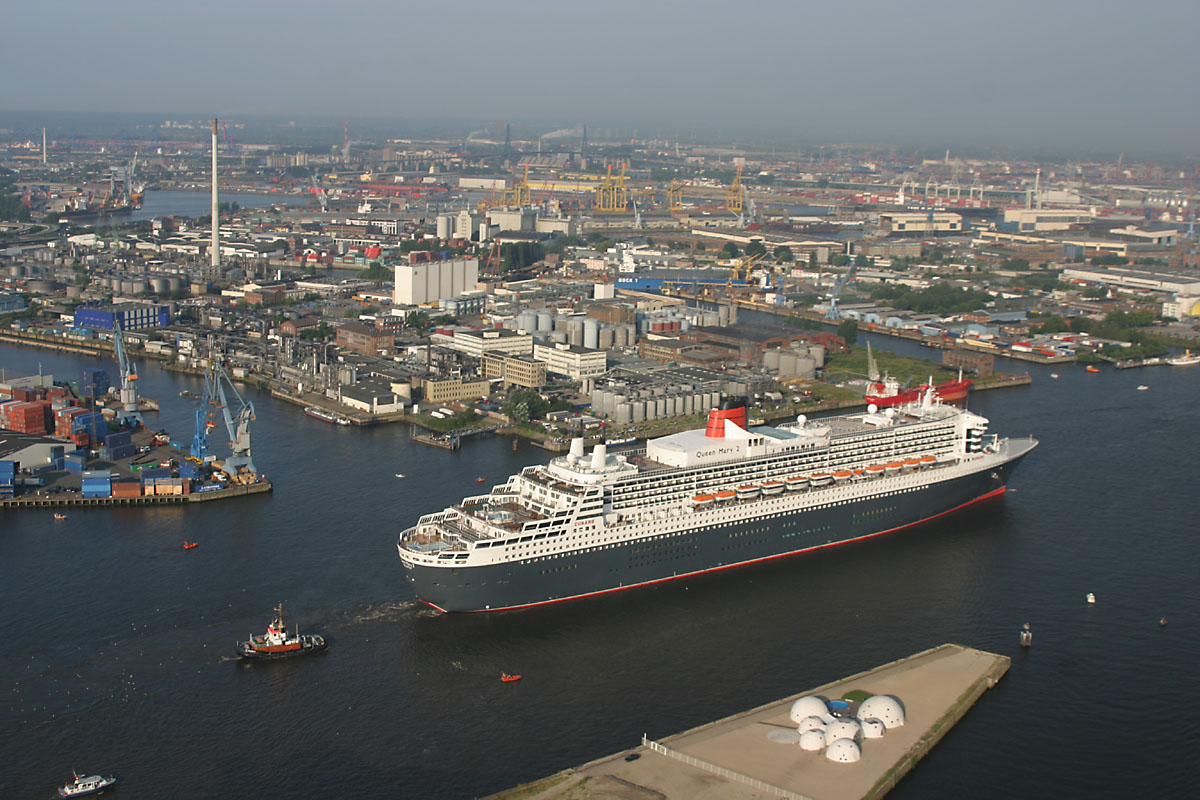 Ankunft der Queen Mary 2 in Hamburg